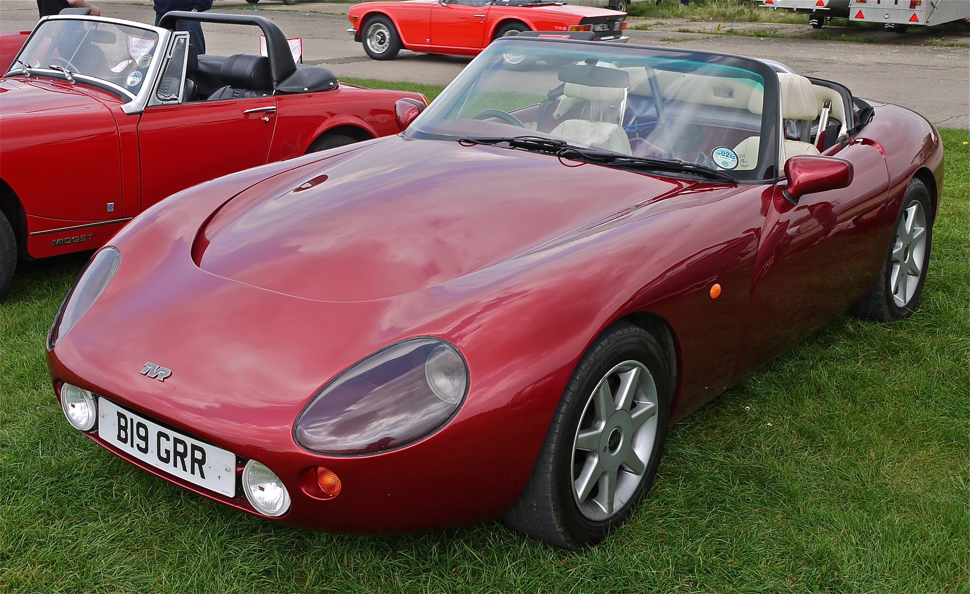 Panasonic G1 14-45 Lens